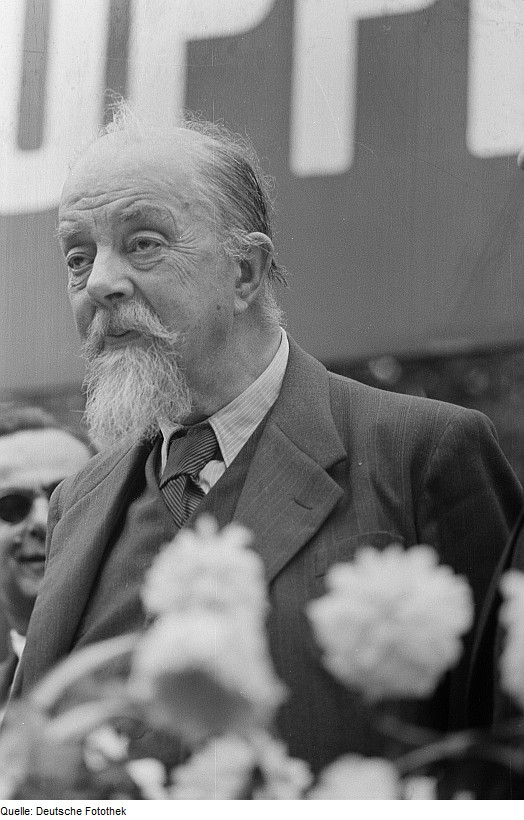 Original image description from the Deutsche Fotothek Eilhard Alfred Mitscherlich auf der Demonstrationstribüne